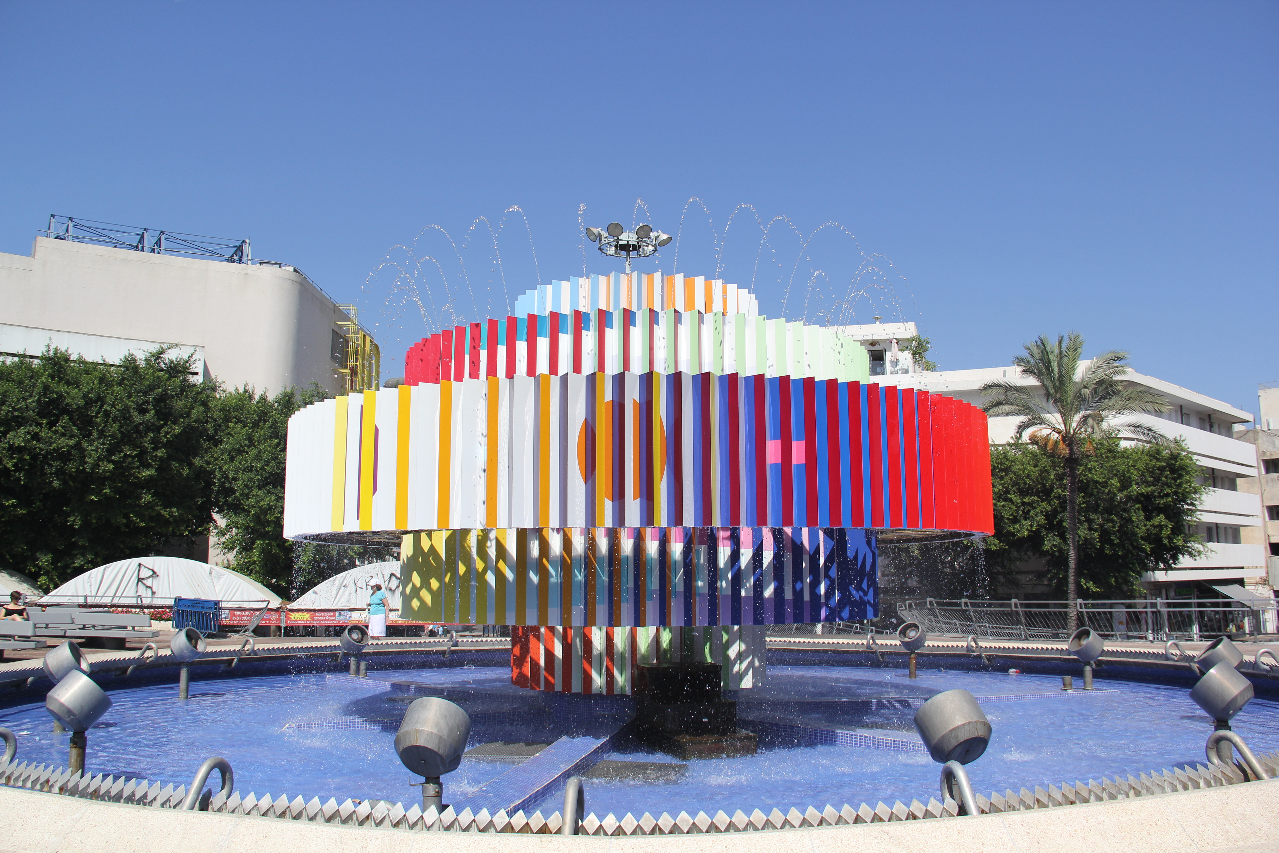 המזרקה המפורסמת של כיכר דיזינגוף בתל אביב